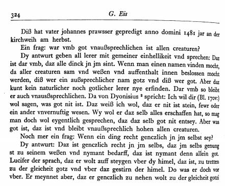 1481 hielt Johannes Prausser OP eine Predigt über die Unaussprechlichkeit des Namens Gottes. Eine Nachschrift ist in der Sammlung Eis, Cod. 114, Bl. 170r/v überliefert. Edition von Gerhard Eis.